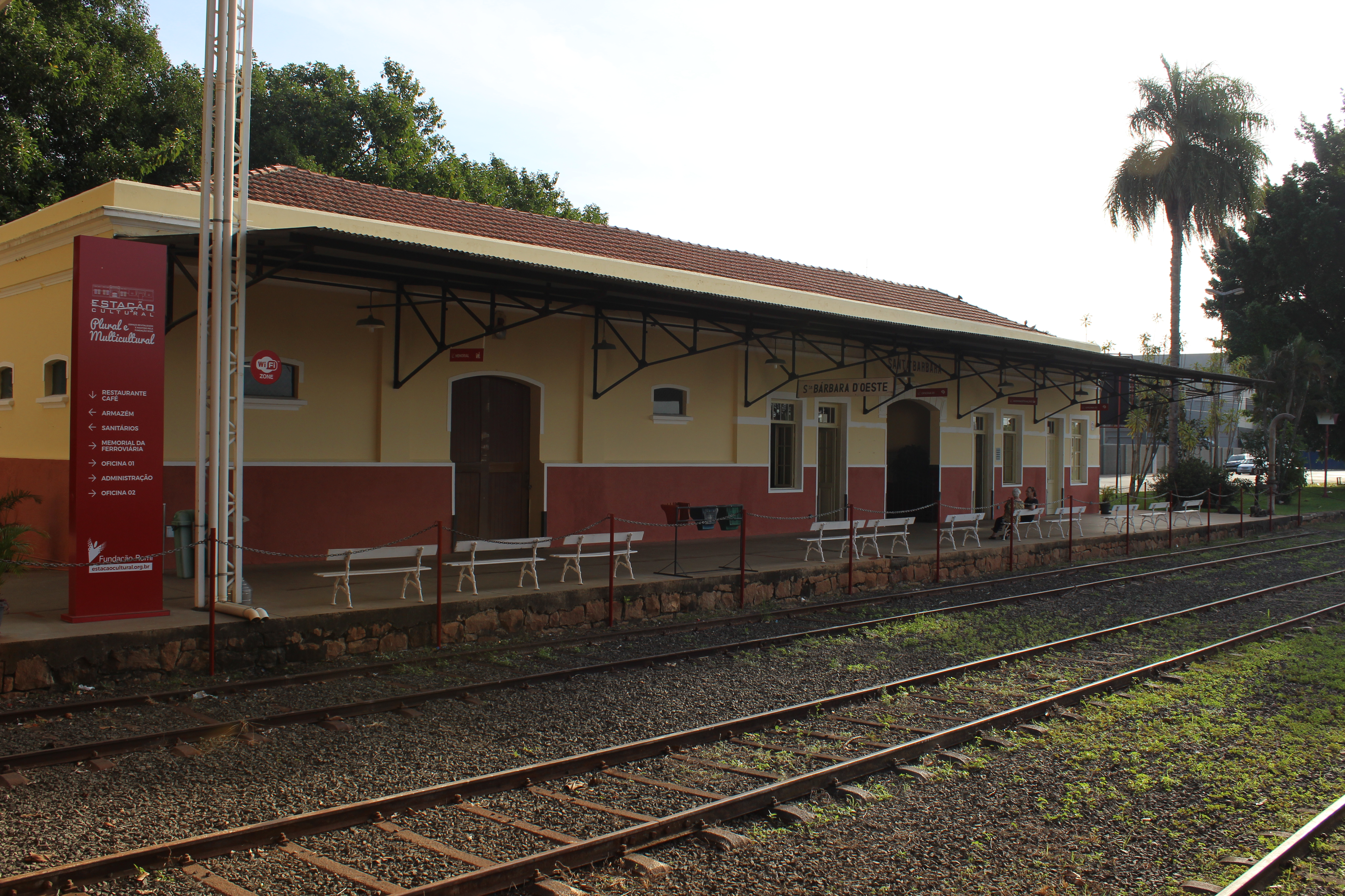 Estação Cultural 2019